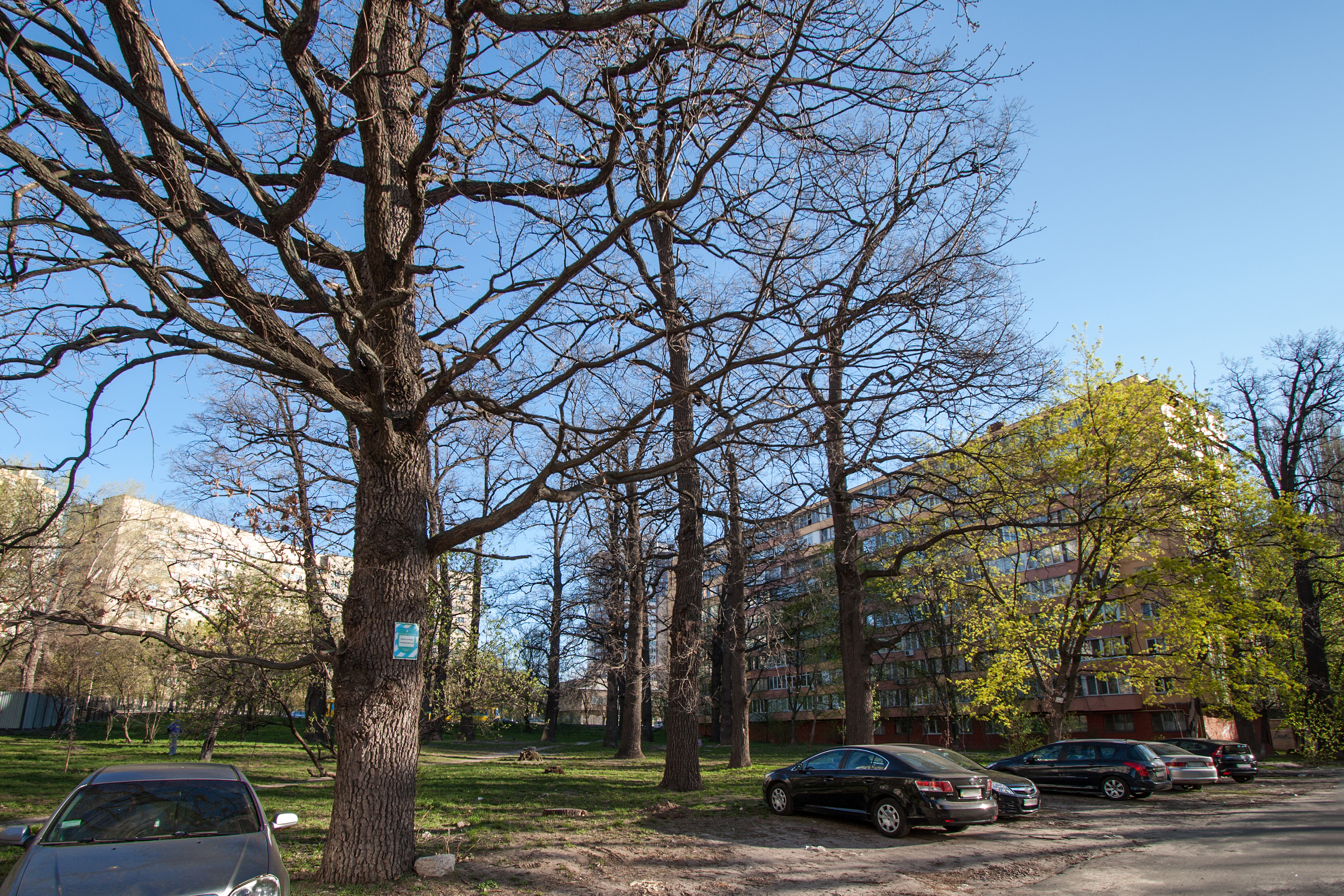 KYIV-76 Старий дубовий гай, 0,3 га, Солом'янський район, вул. Борщагівська,141. КП УЗН Солом'янського району. 50°26′42.09″ пн. ш. 30°26′56.16″ сх. д.